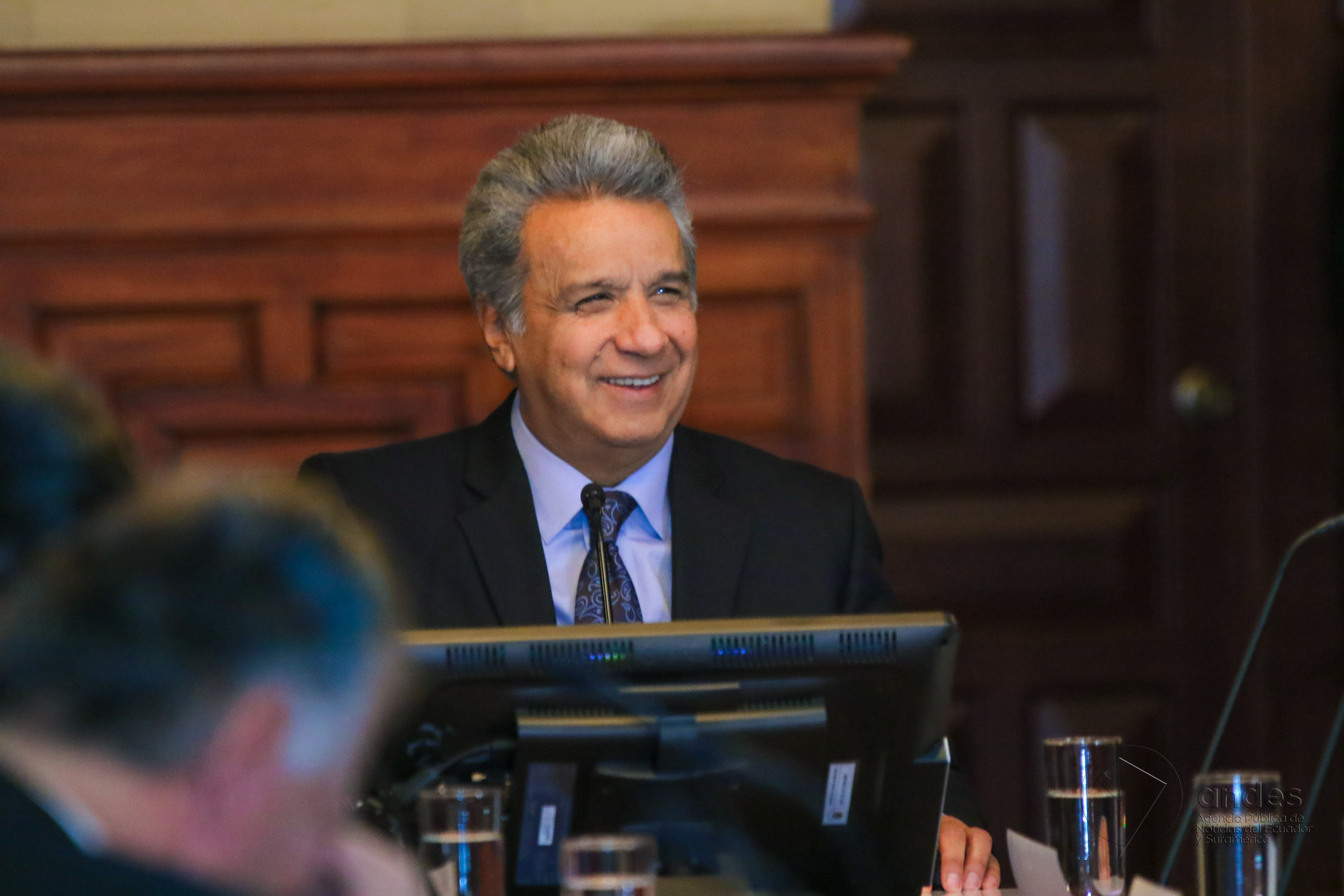 11 Jul (Andes).- Frente de transaparencia pesenta mecanismos de lucha contra la corrupción en Carondelet. Fotografías: Carlos Rodríguez/Andes.